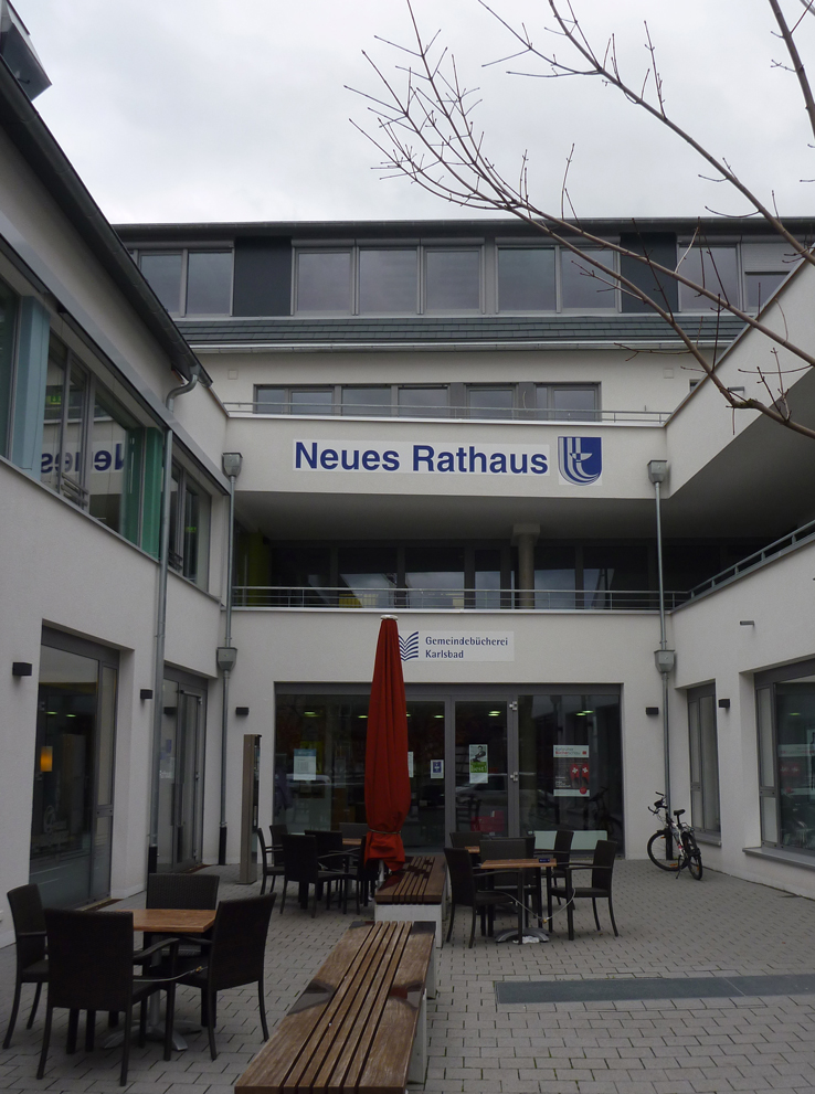 Außenansicht der Gemeindebücherei Karlsbad